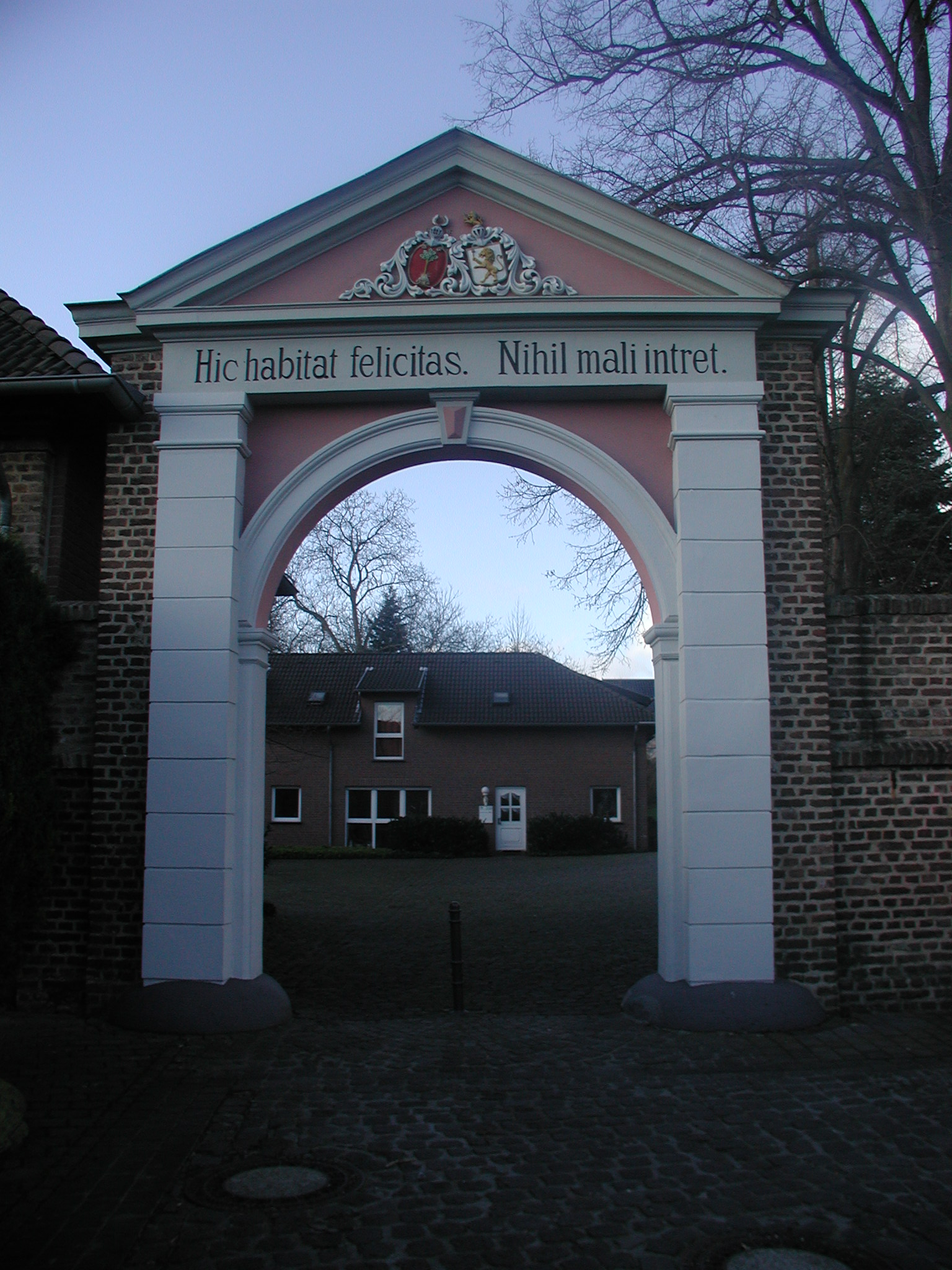 Brühl-Heide, Kloster Benden